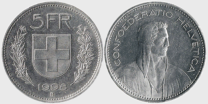 Вільгельм Телль: швейцарська монет 5 франків 1998 р.